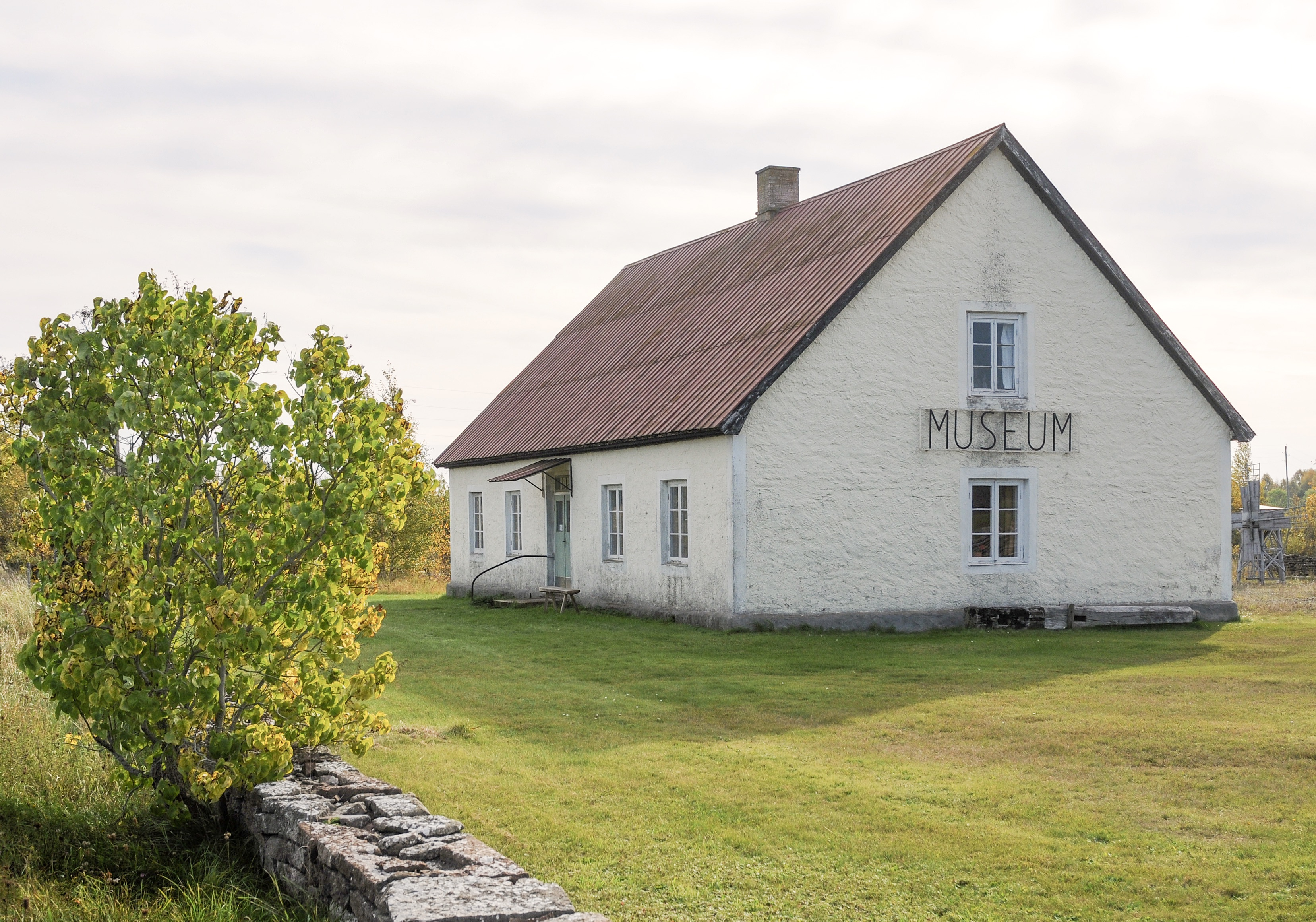 Persnäs fattighus i Borgholms kommun, Öland